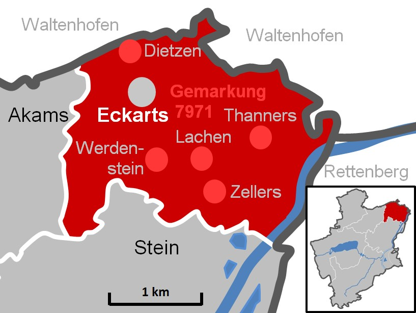 Immenstadt Gemarkung 7971 Eckarts (erstellt mit MS-Excel)